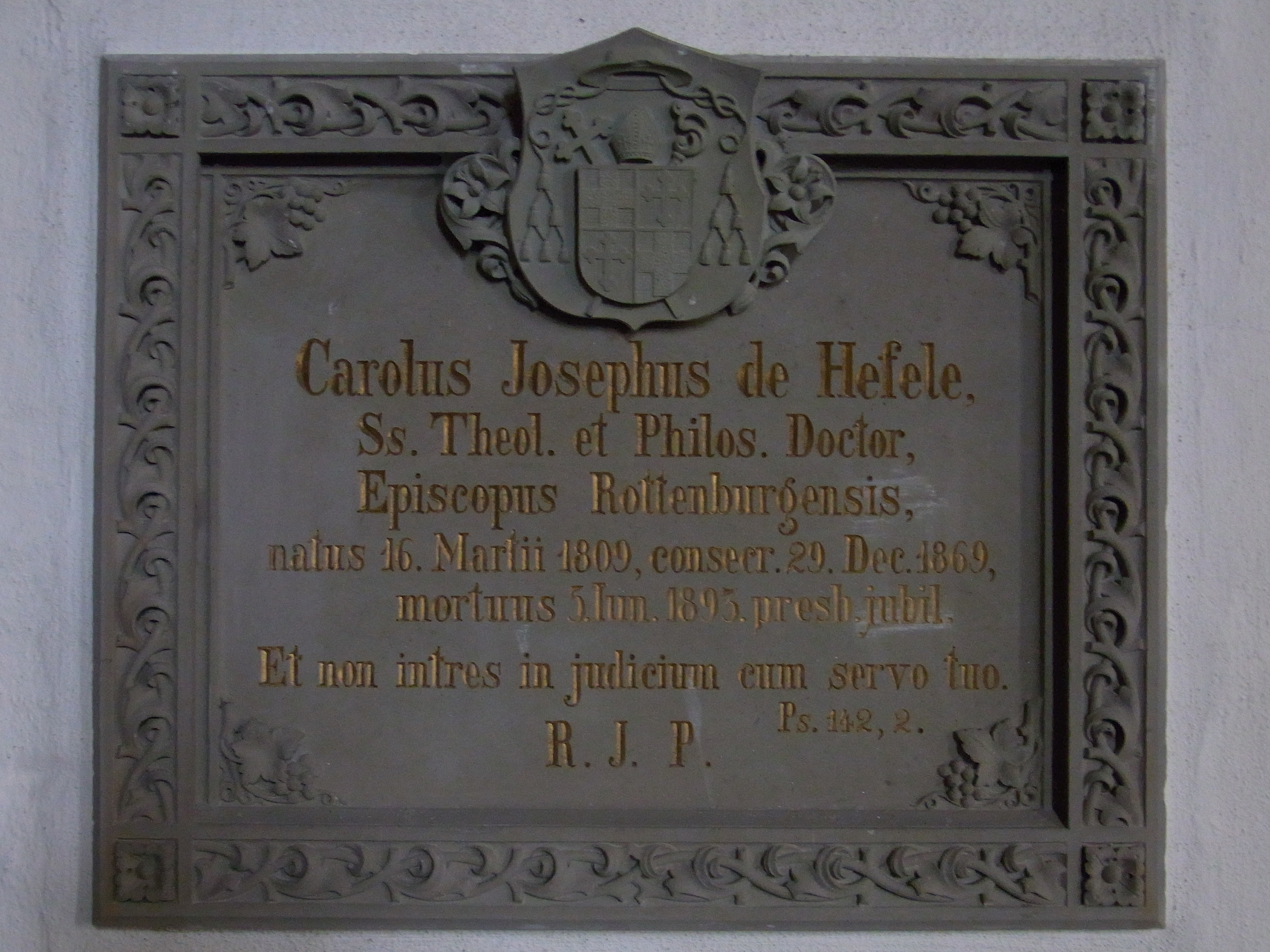 Rottenburg am Neckar: Sülchen Sülchenkirche: Grabstelle Karl Joseph von Hefele